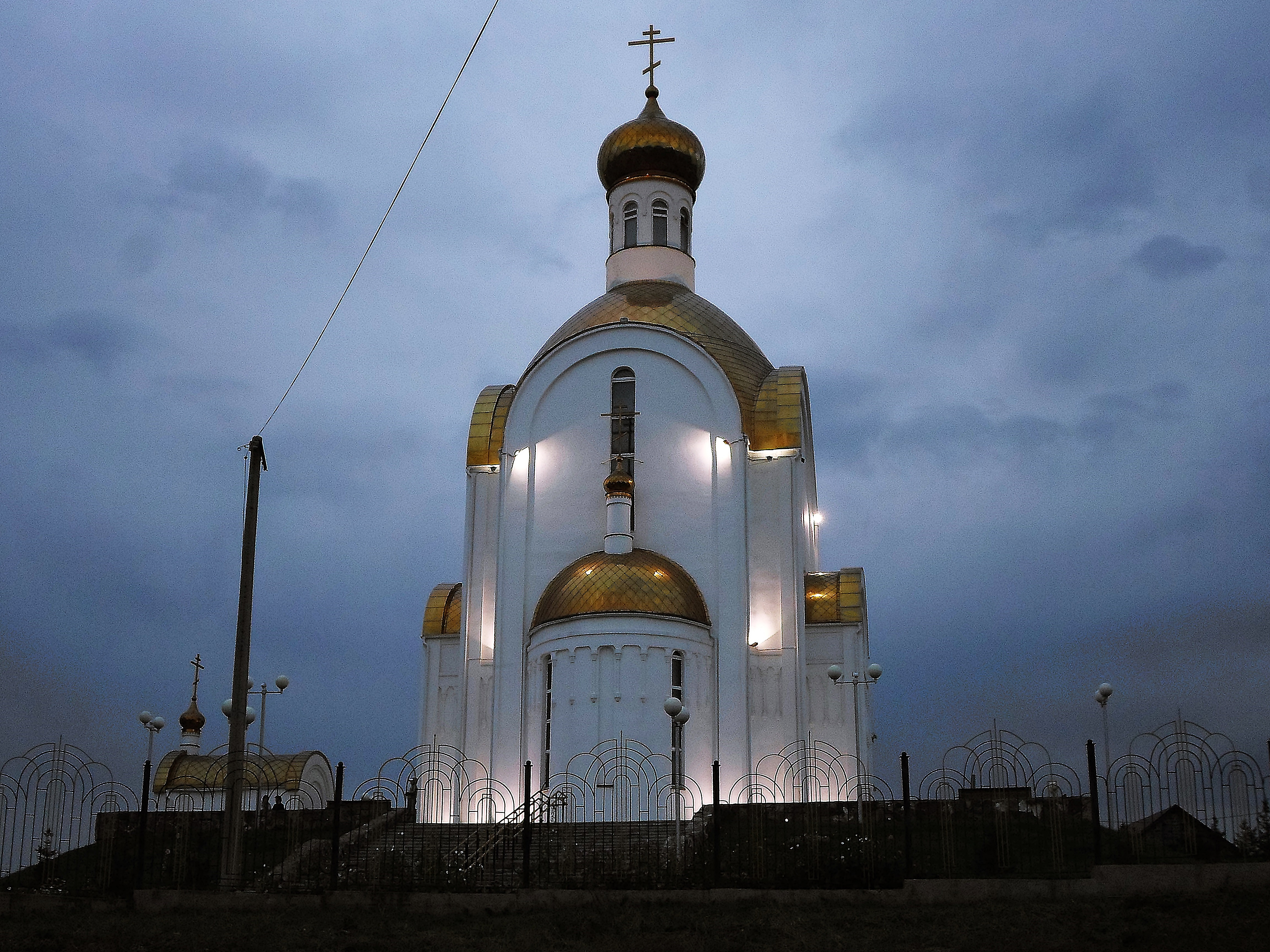 Часовня Даниила Ачинского в Ачинске.